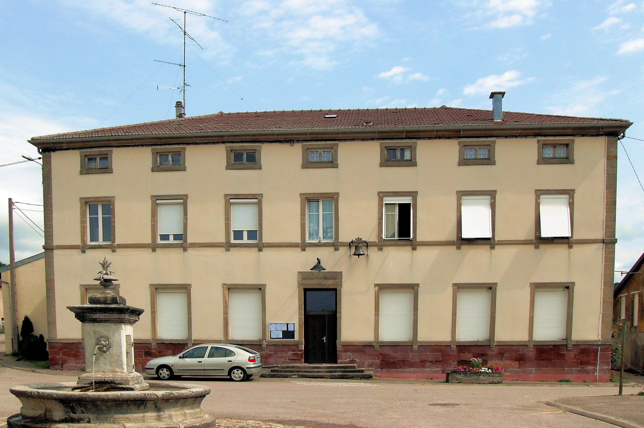 La mairie et maison commune de Vaubexy